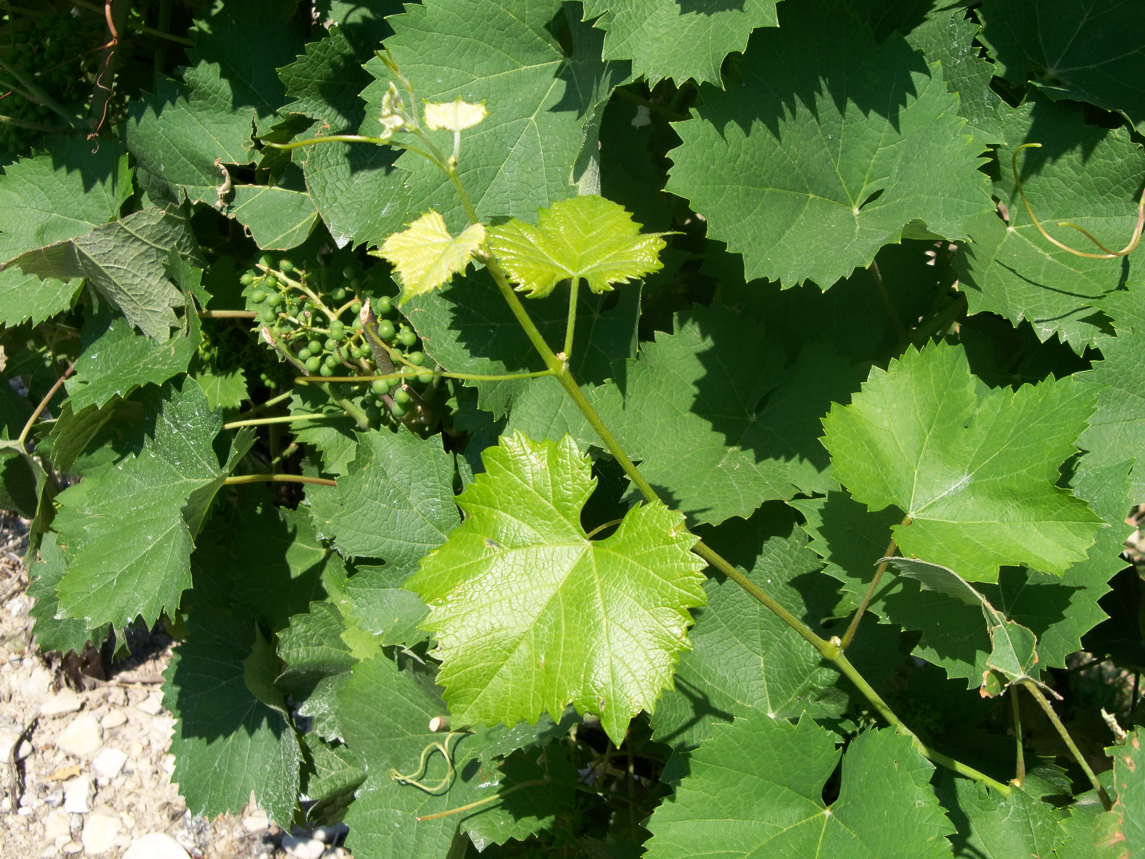 Feuilles de vignes - Mourvedre